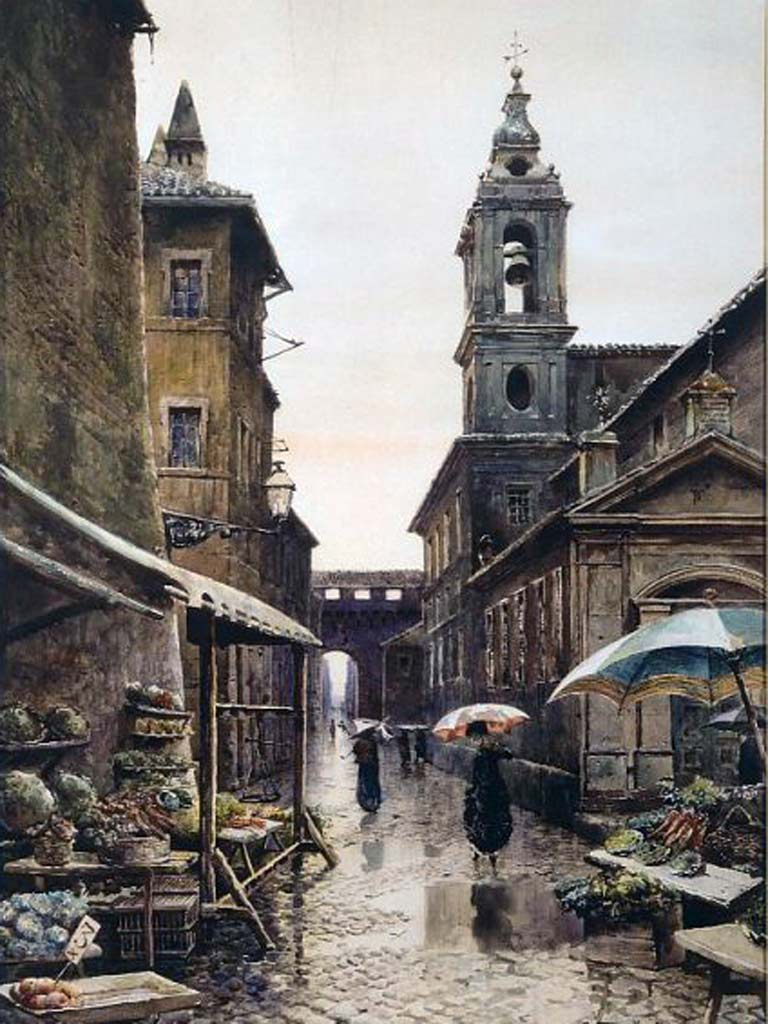 Vicolo del Campanile in Rome (rione Borgo)